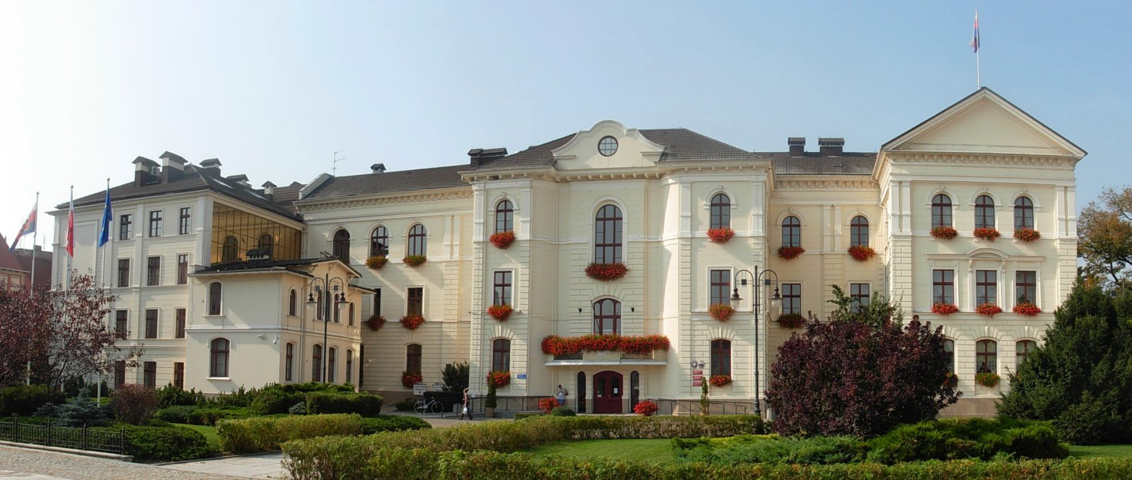 Budynek ratusza w Bydgoszczy, dawne kolegium jezuitów (1644-1653)